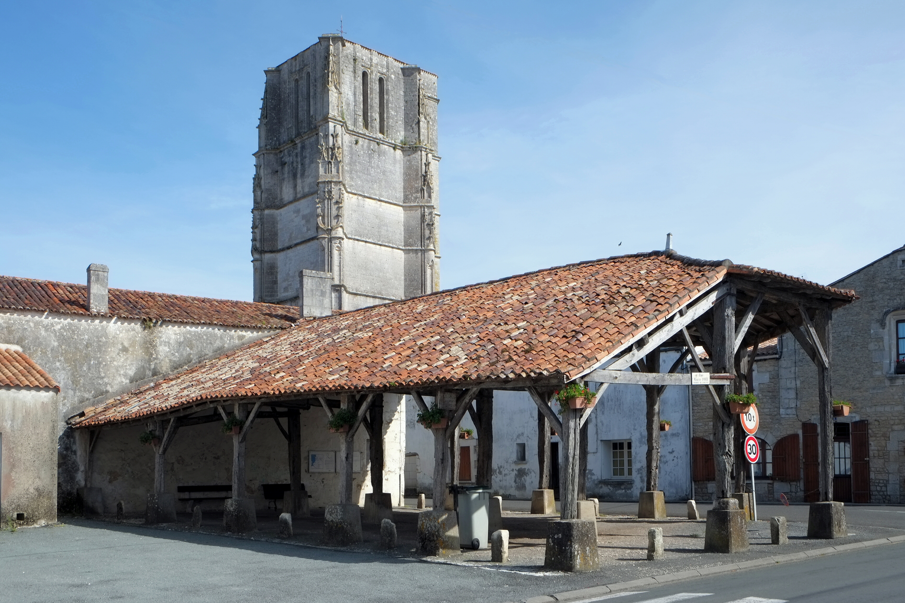 Halle et clocher de l'église Saint-Jean-Baptiste Saint-Jean-d'Angle Charente-Maritime France